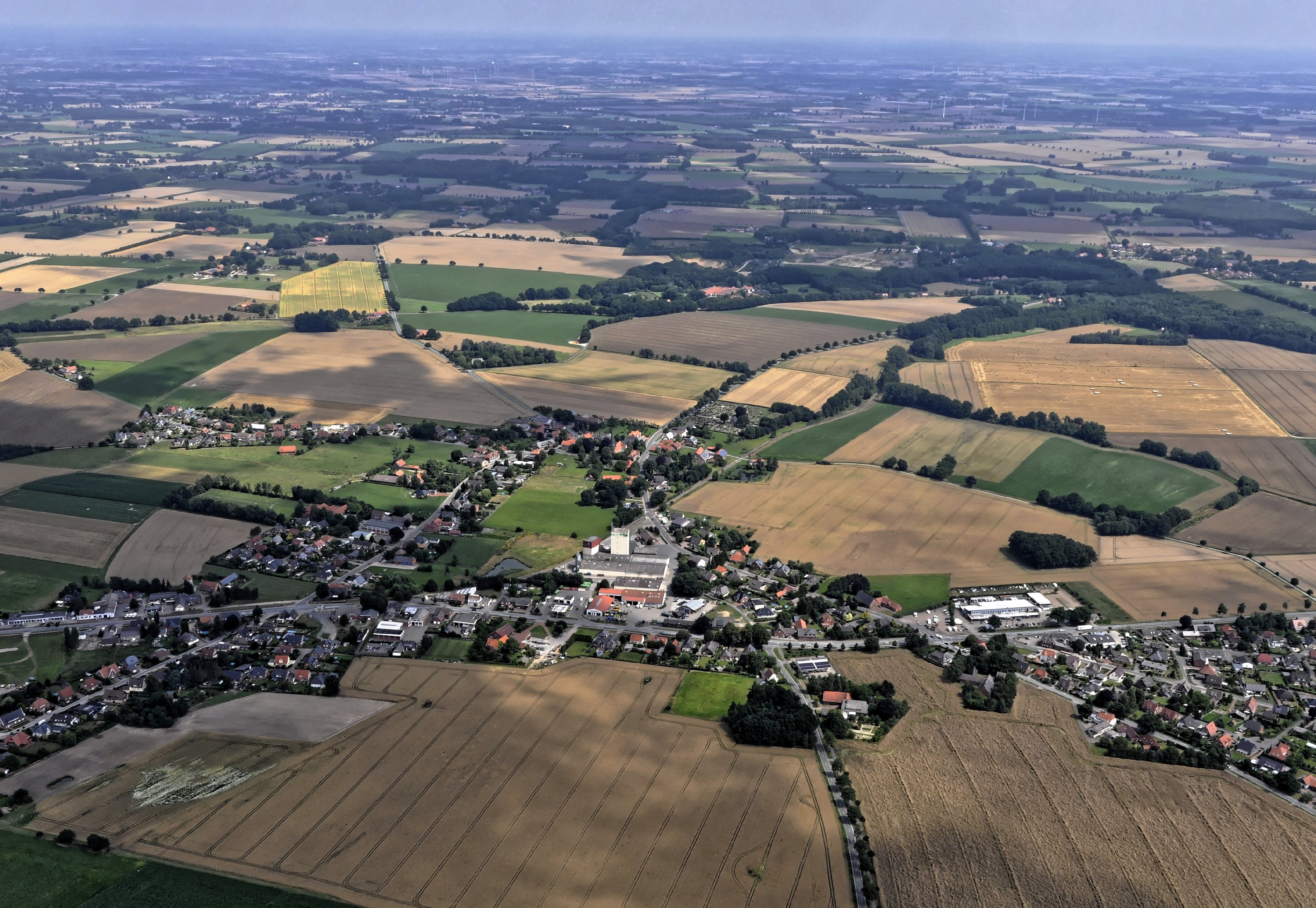 Bilder vom Flug Nordholz-Hammelburg 2015: Heiligenfelde.